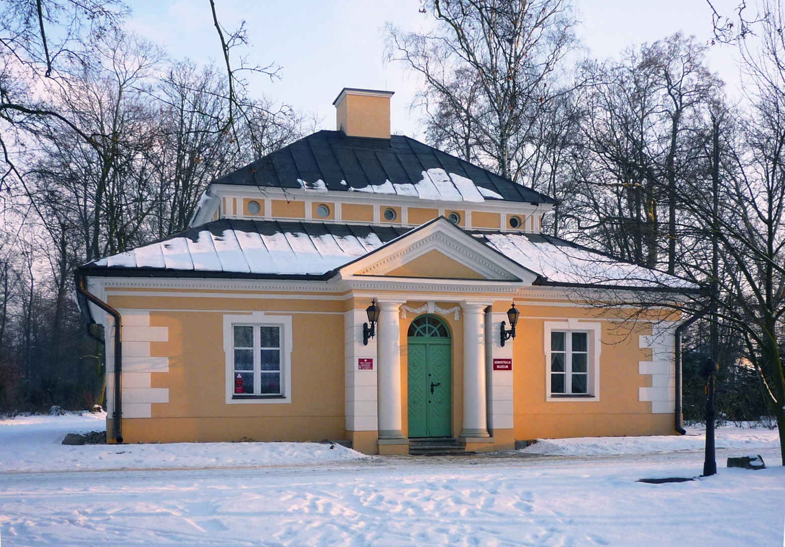 Dobrzyca, ul. Pleszewska 5A - zespół pałacowy: dom ogrodnika (oficyna) z końca XVIII w. (zabytek nr 4/A)